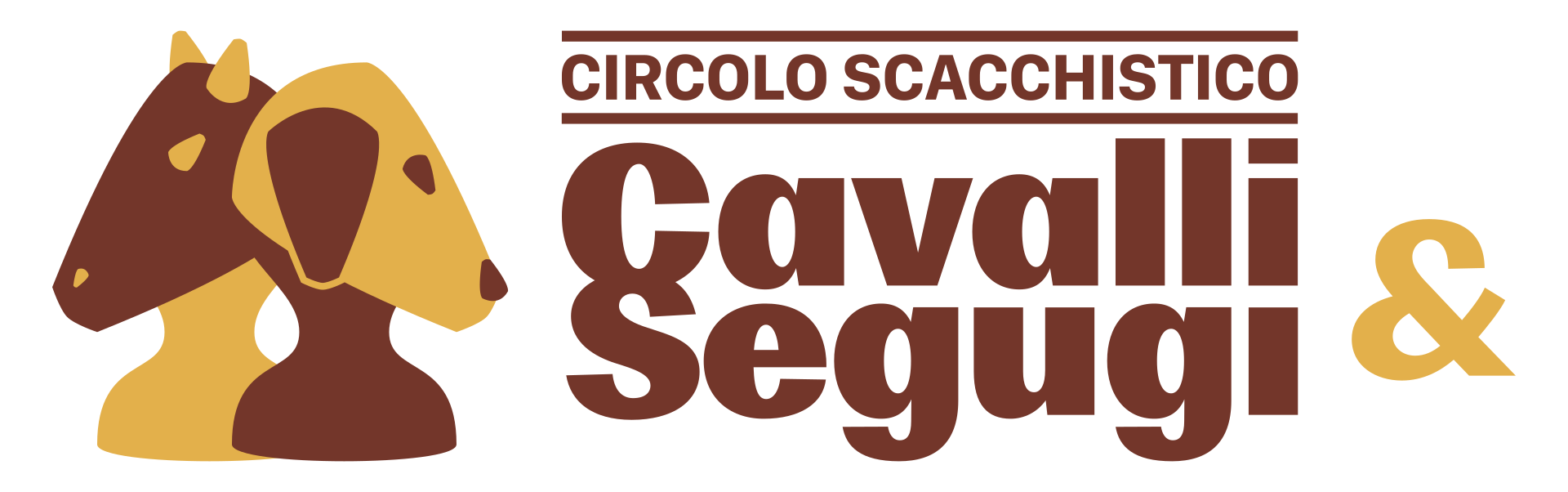 Il logo del club.